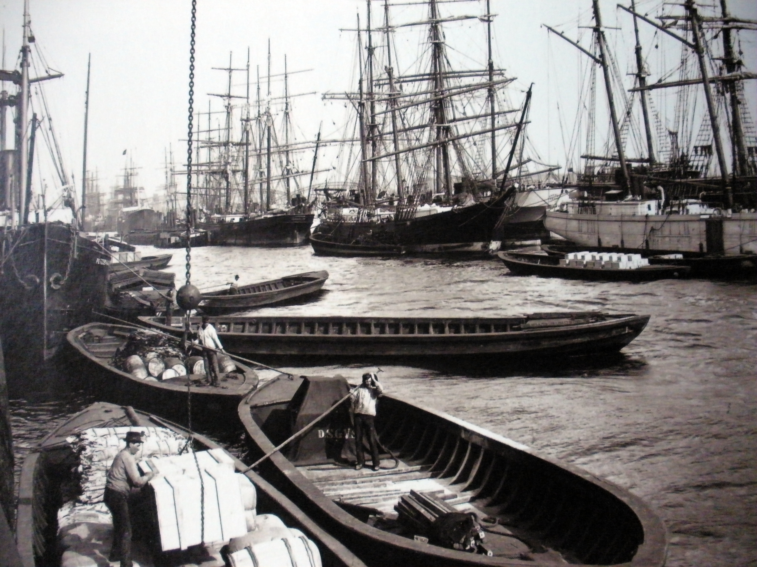 Kirchenpauerkai, Norderelbe